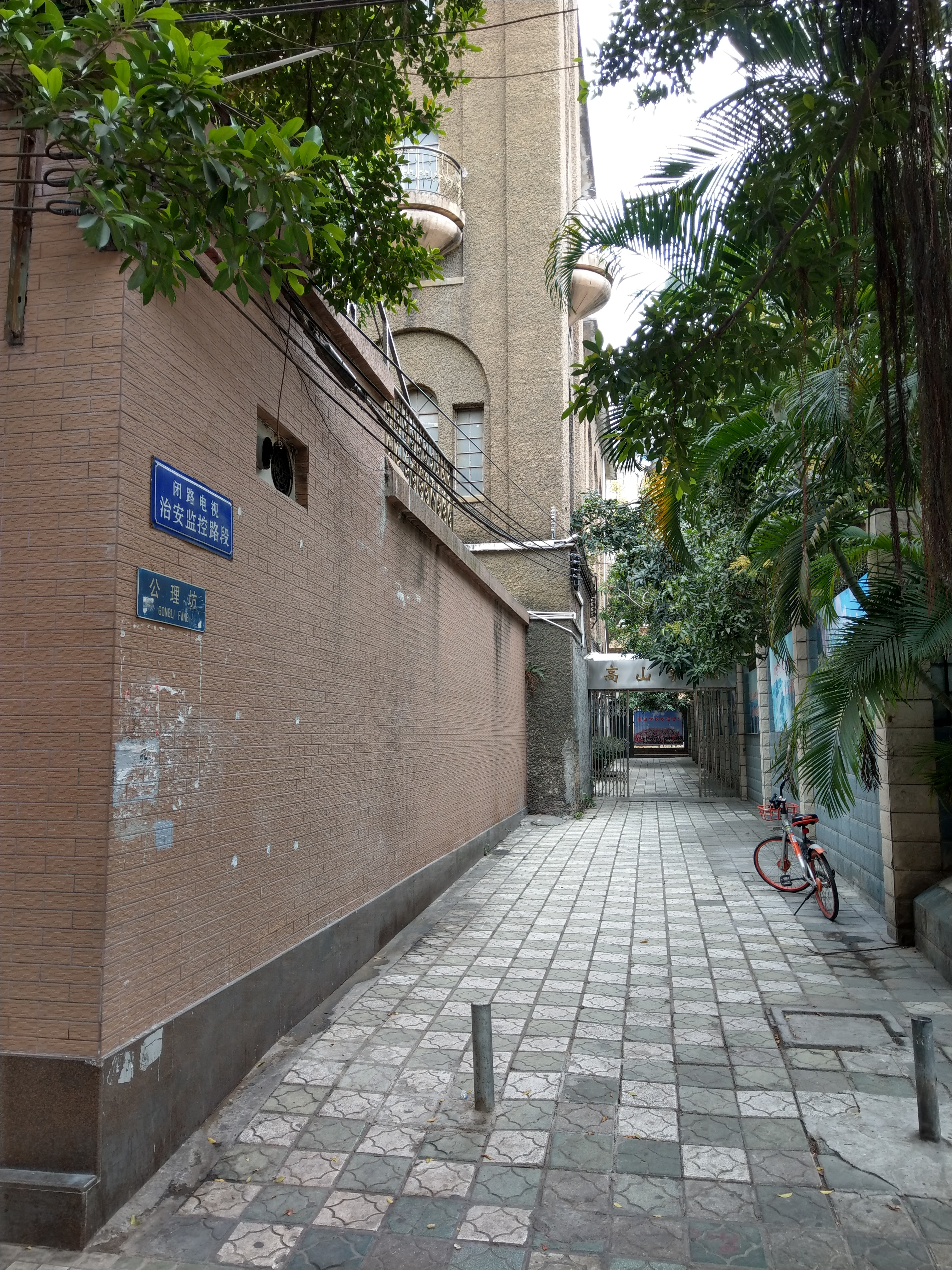 廣州光孝路基督教光孝堂原屬廣東公理會，教堂旁之公理坊便是因此得名。